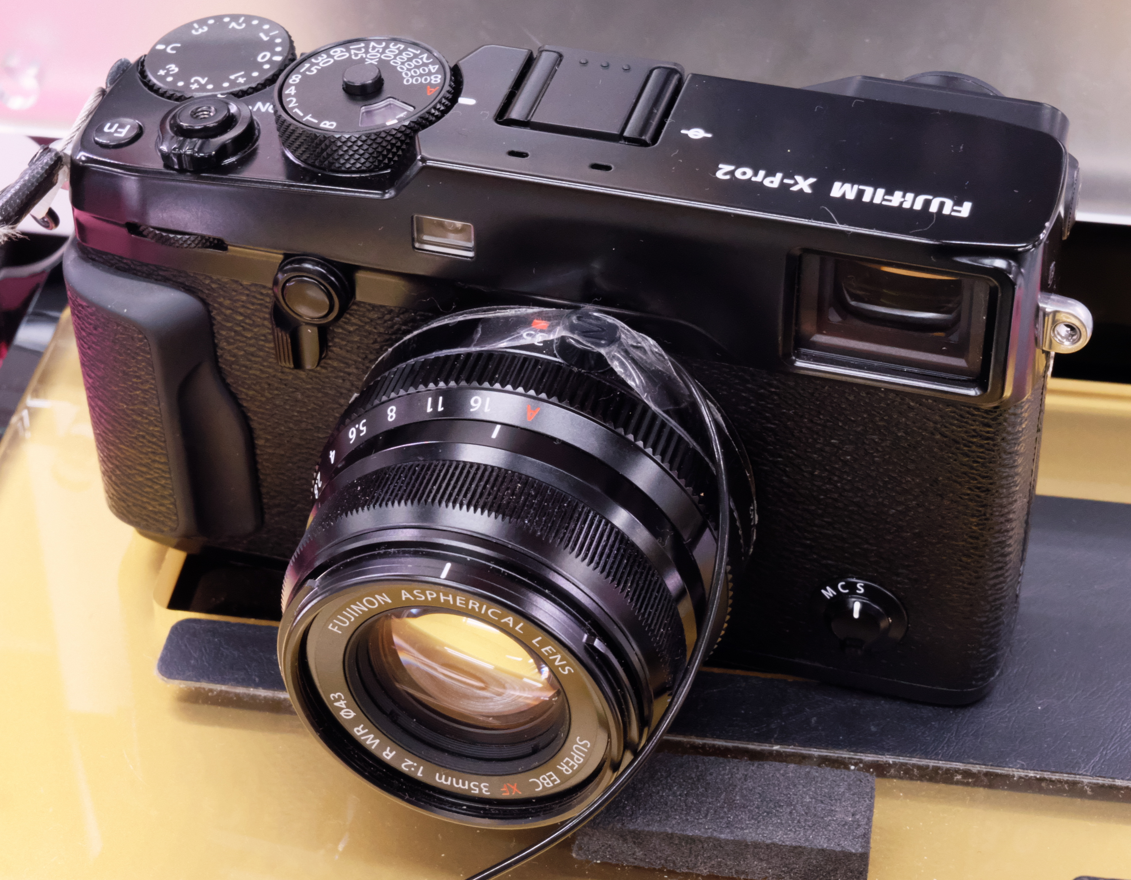 FUJIFILM X-Pro2（ヨドバシカメラにて撮影）